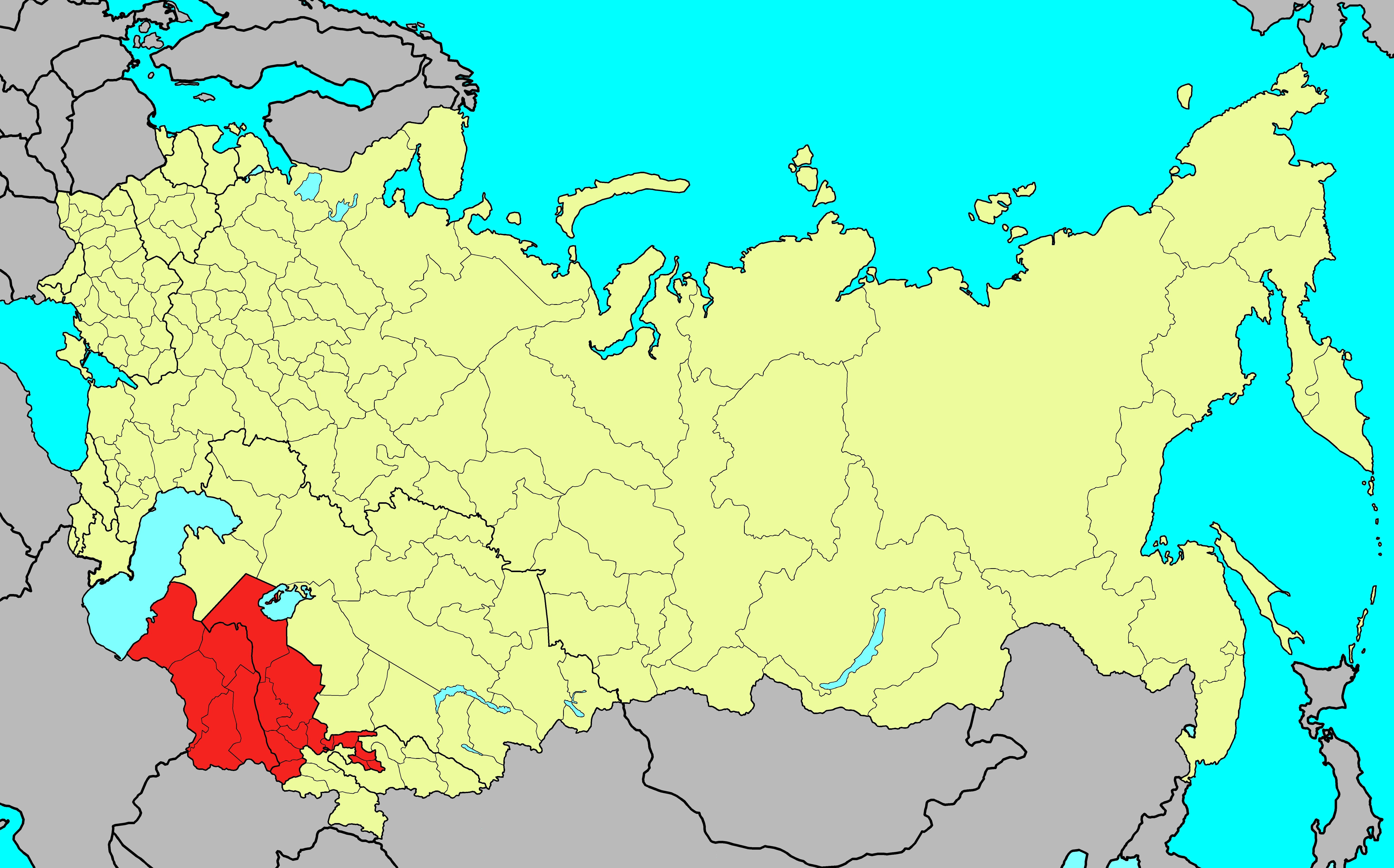 Туркестанский военный округ ВС СССР на 1 января 1989 года